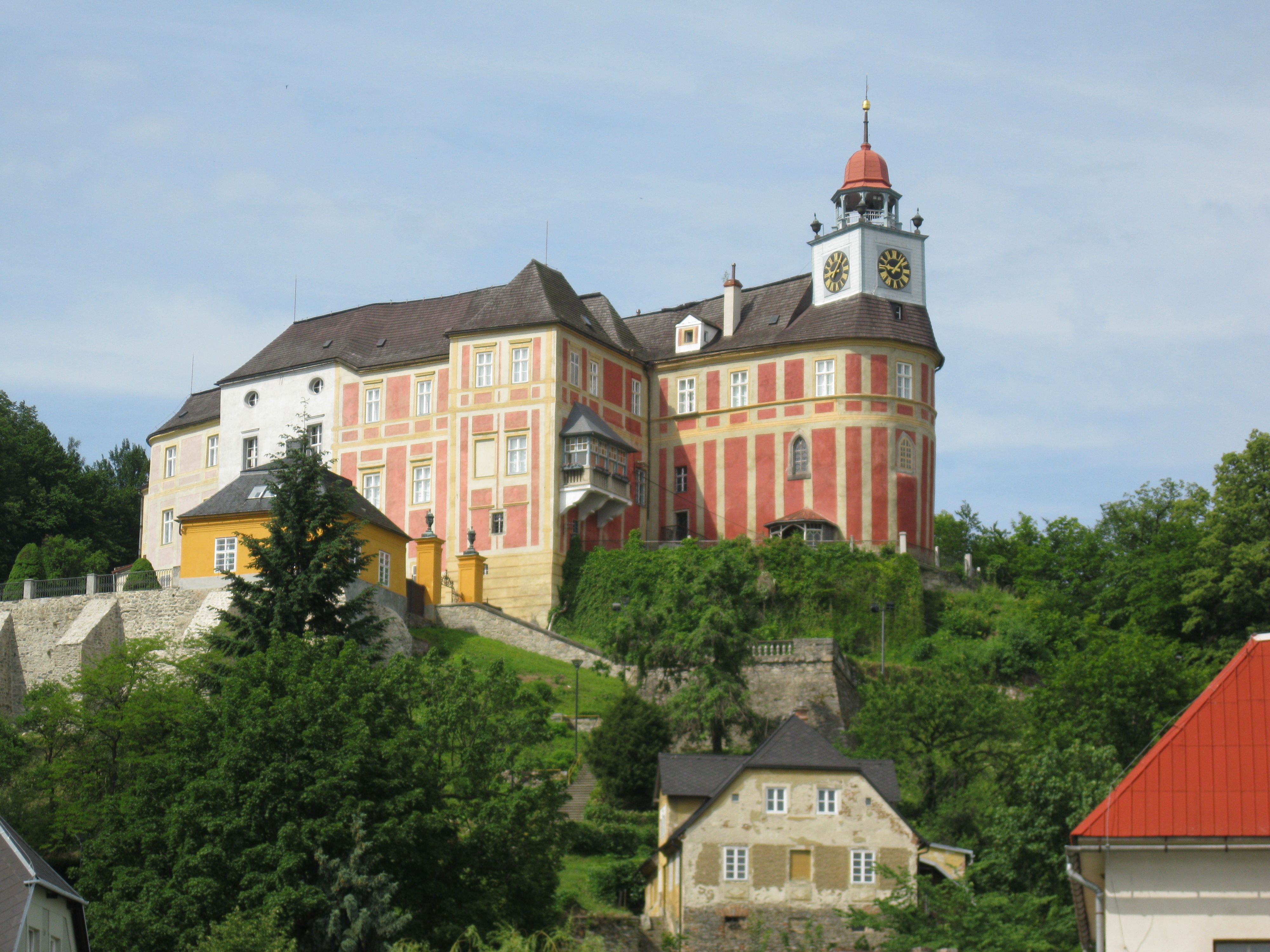 Zámek Jánský vrch Město Javorník, Město Javorník 1